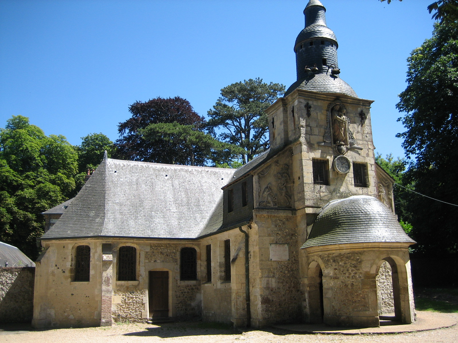 « Cette chapelle, construite en 1600-1615 par les bourgeois et marins de Honfleur sur un terrain donné par Mme de Montpensier remplace une ancienne chapelle fondée avant l’an 1023 par Richard II, duc de Normandie et disparue dans un éboulement de la côte au XVIe siècle » (Panneau signalétique réalisé sur le site par la Société le Vieux Honfleur en août 1902)